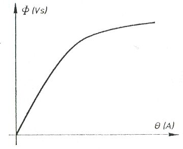 Figura 4.Karakteristika e qarkut magnetik